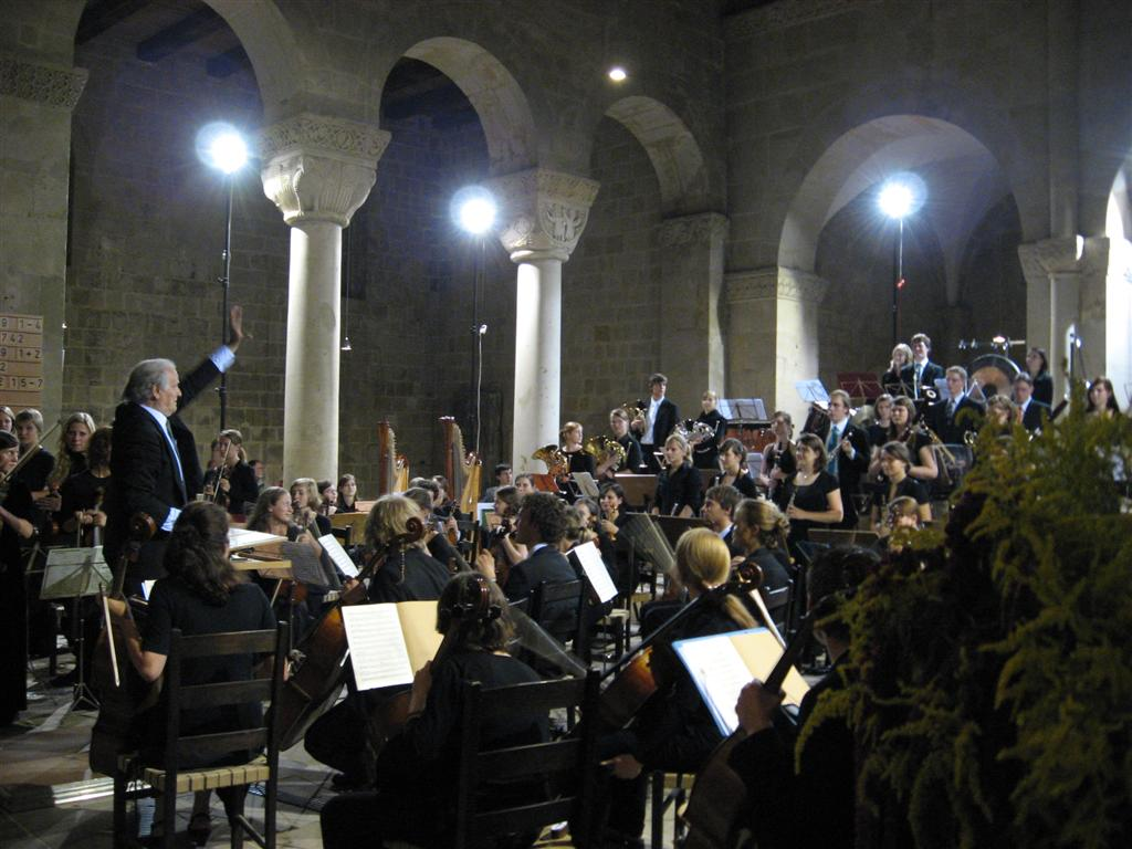 Konzert des Landesjugendsinfonieorchesters Sachsen-Anhalt am 1.9.2007 in der Stiftskirche St. Servatii Quedlinburg während des Quedlinburger Musiksommers